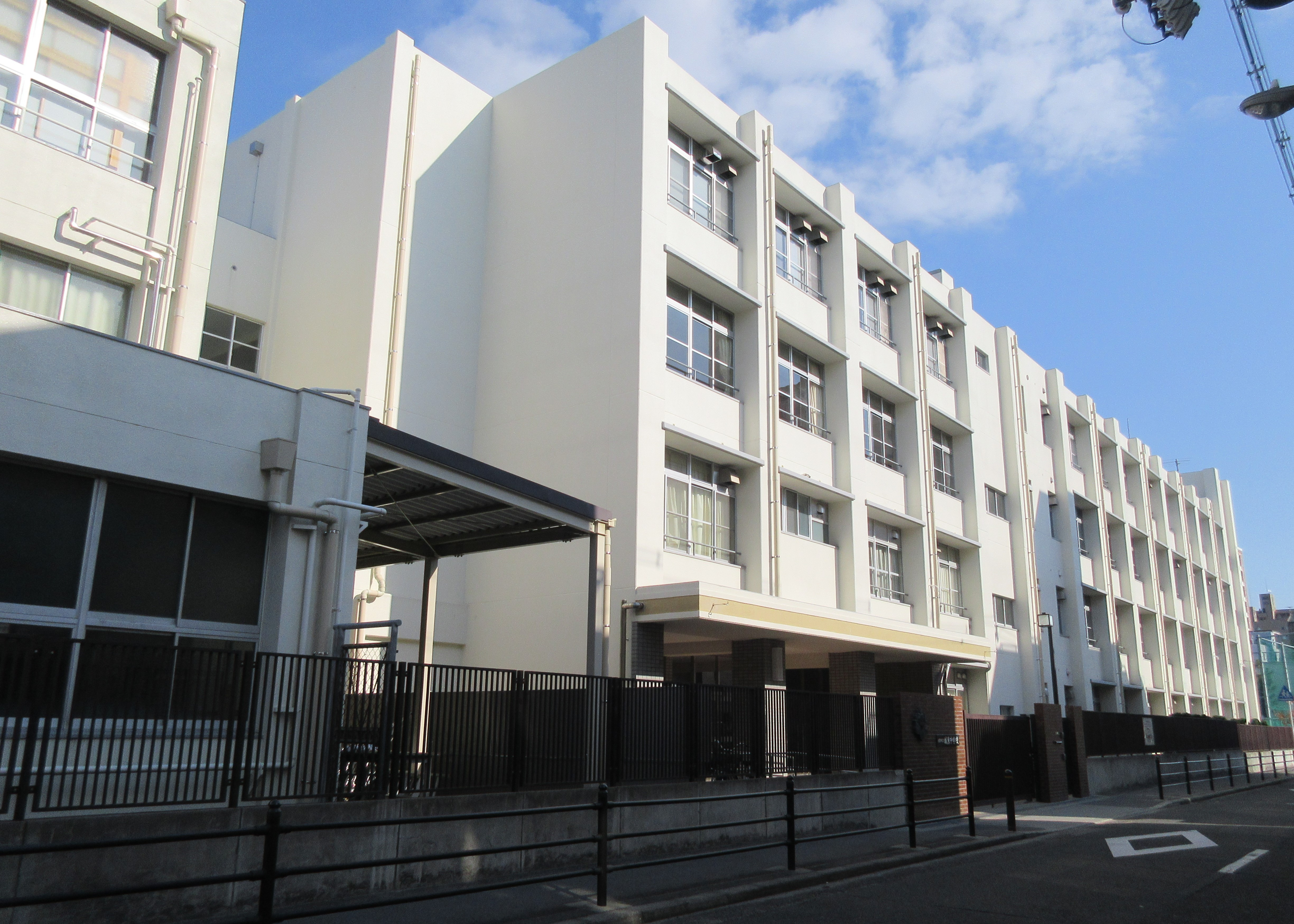 大阪市立城東中学校